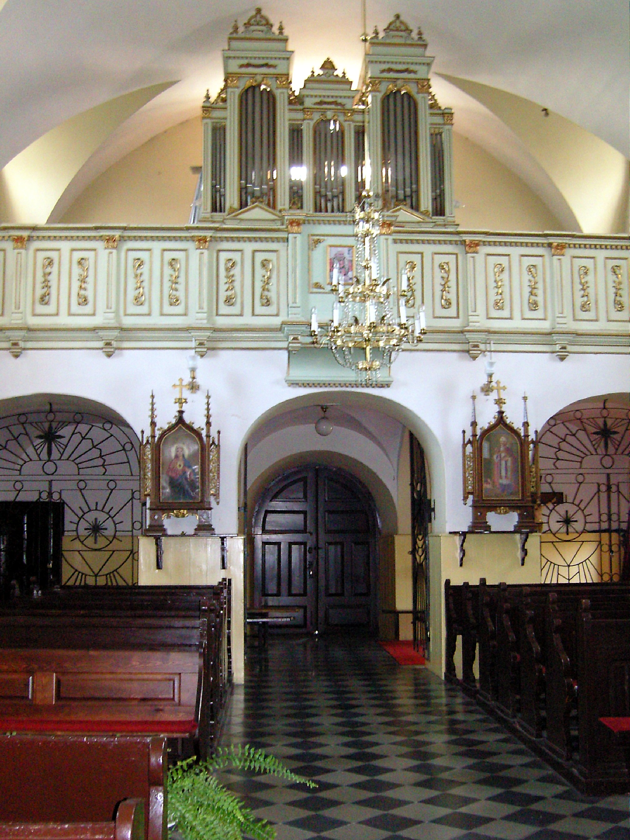 Gorzkow_Church_insidelook